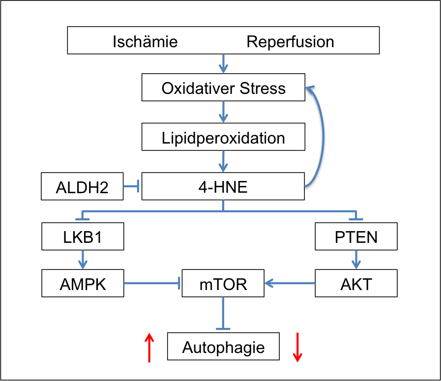 Prozess der ALDH-2 Autophagie